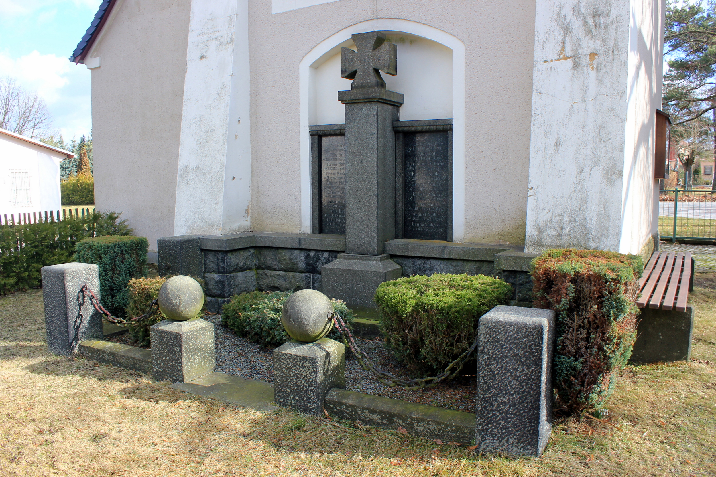 Hornjoserbsce: Wojerski pomnik za padłych Prěnjeje swětoweje wójny w Dźěžnikecach.